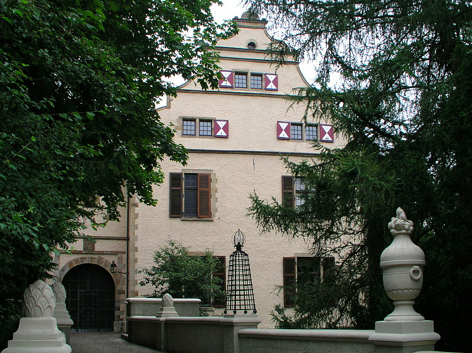 Thyssen-Wohnsitz Landsberg